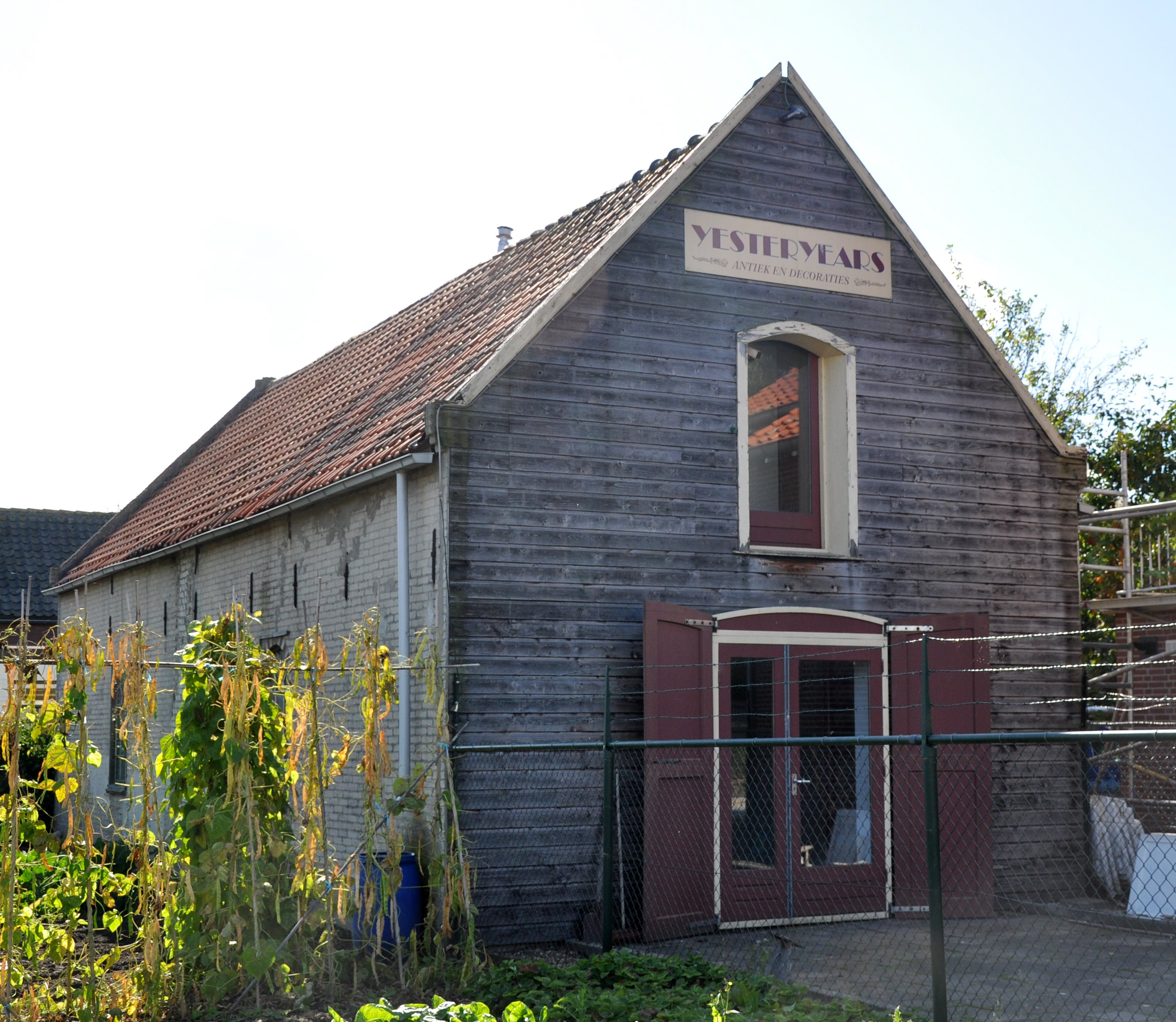 DSC_0134 Boerderij, Industriestraat 4 Lage Zwaluwe, rm 521498